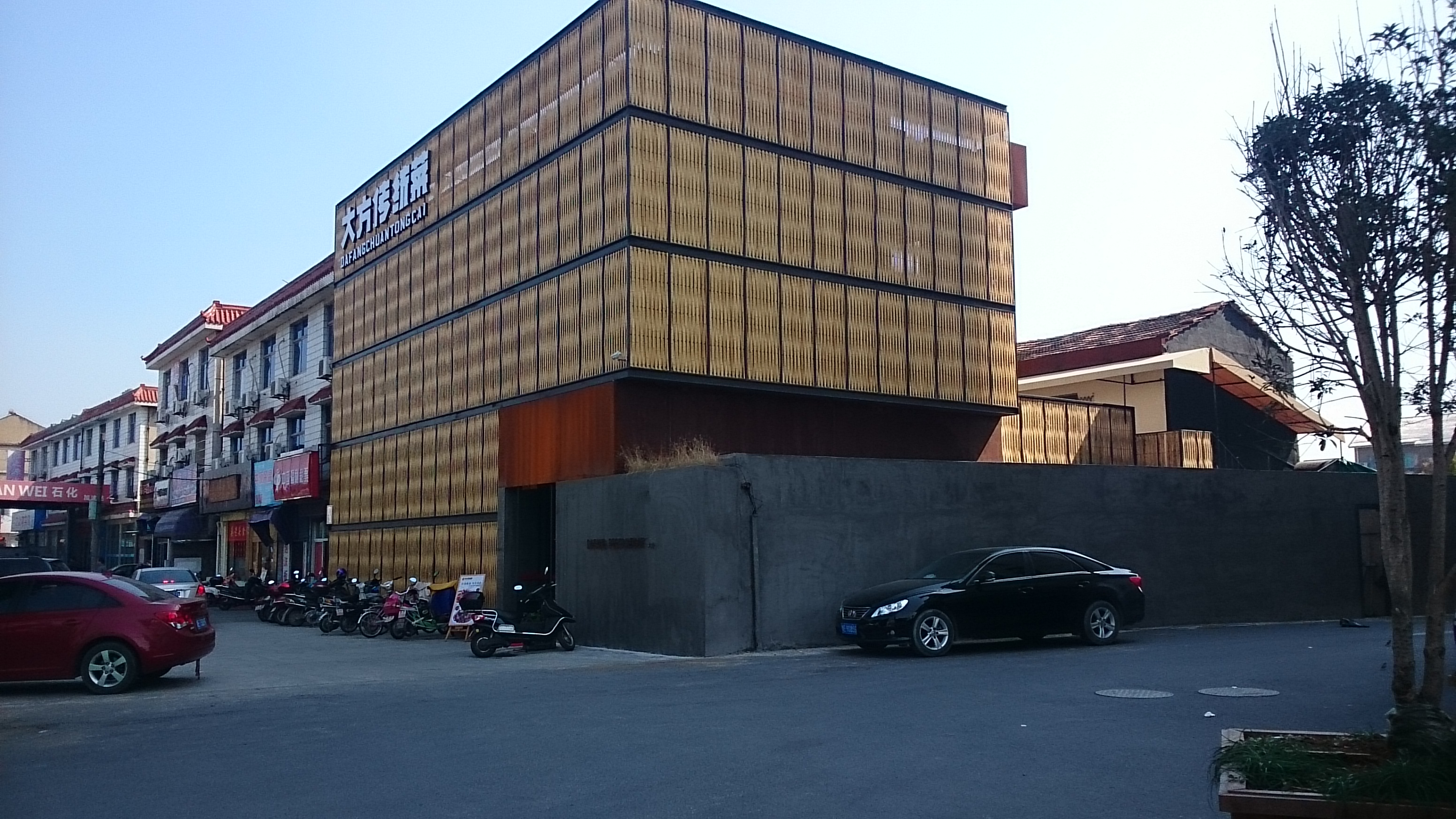 安吉縣竹風格設計建築